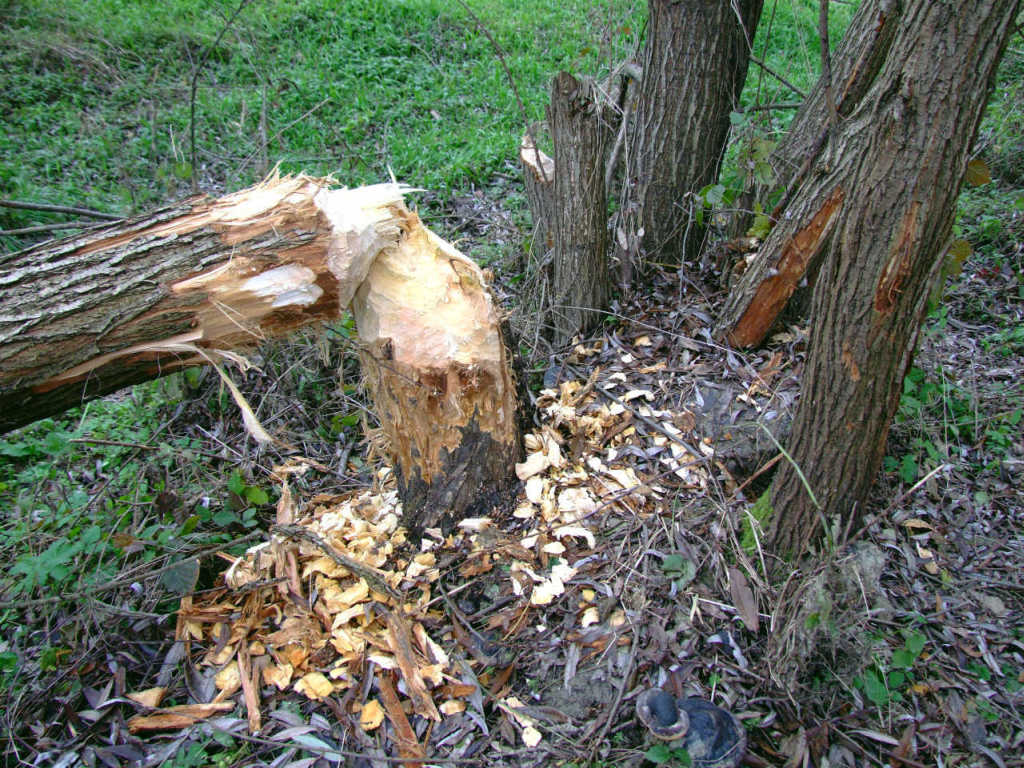 Ślady bobrów